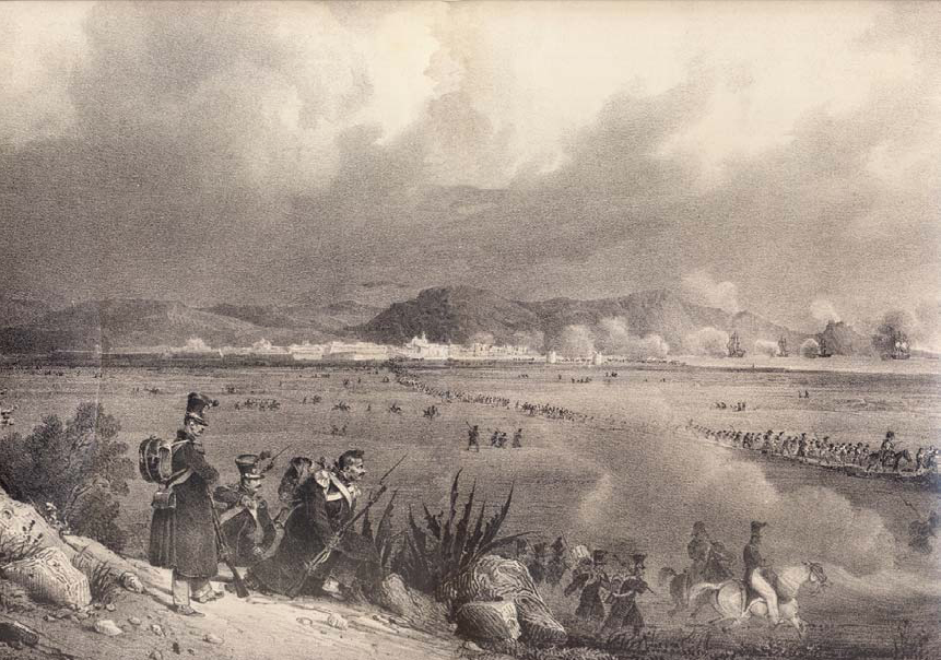 Setge de Roses de 1808, segons un gravat del segle XIX.